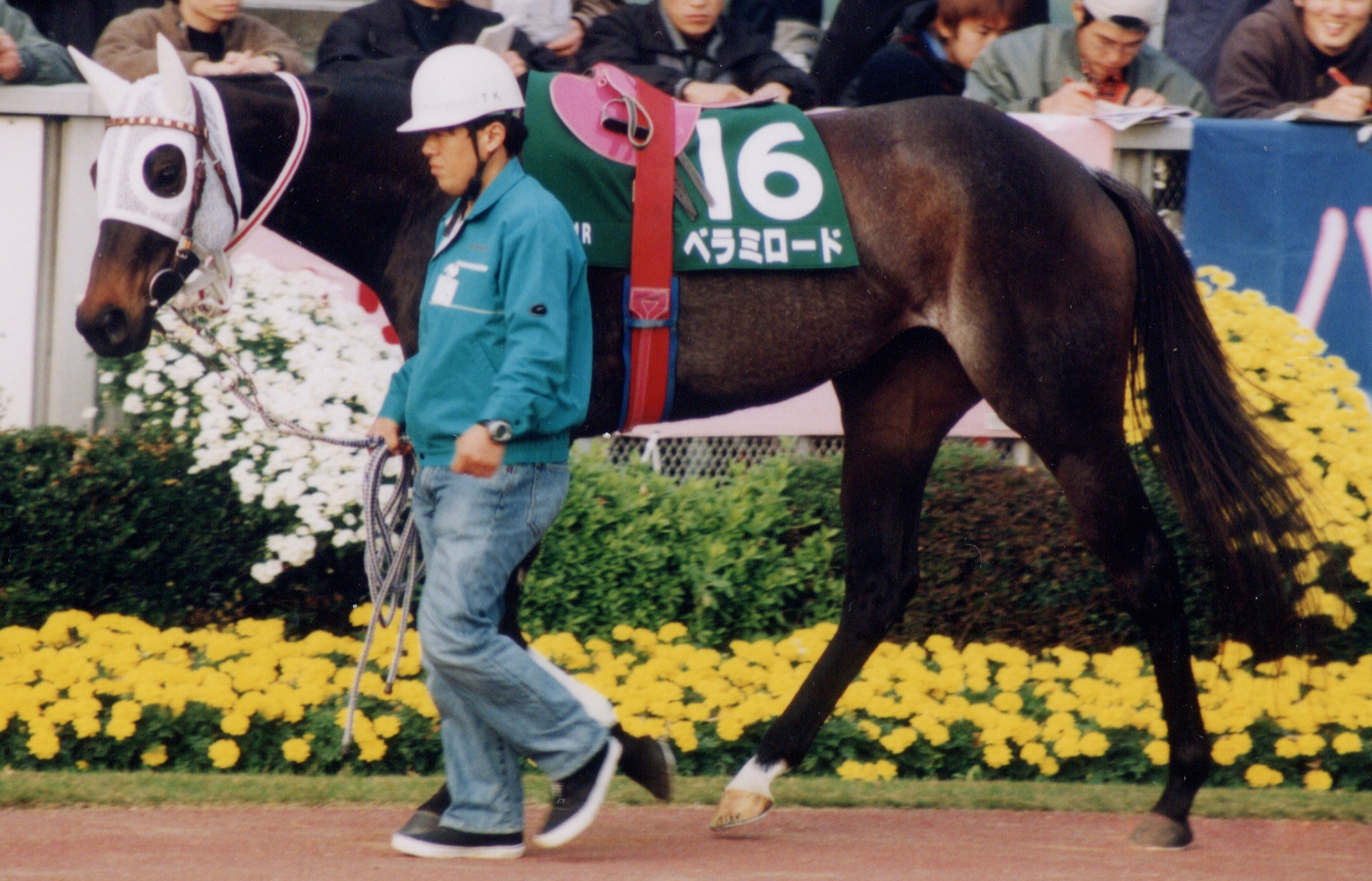 Belle Ami Lord